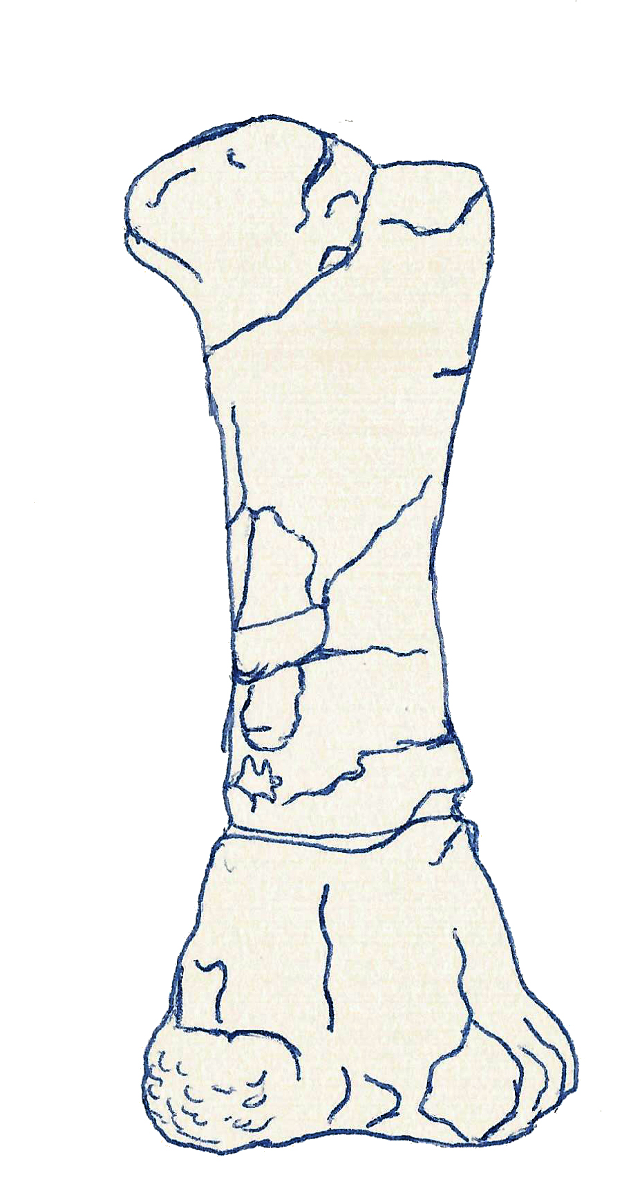 Illustration of a fossil of Cryptosaurus